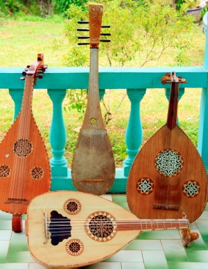 چند قنبوس رایج در جنوب شرق آسیا